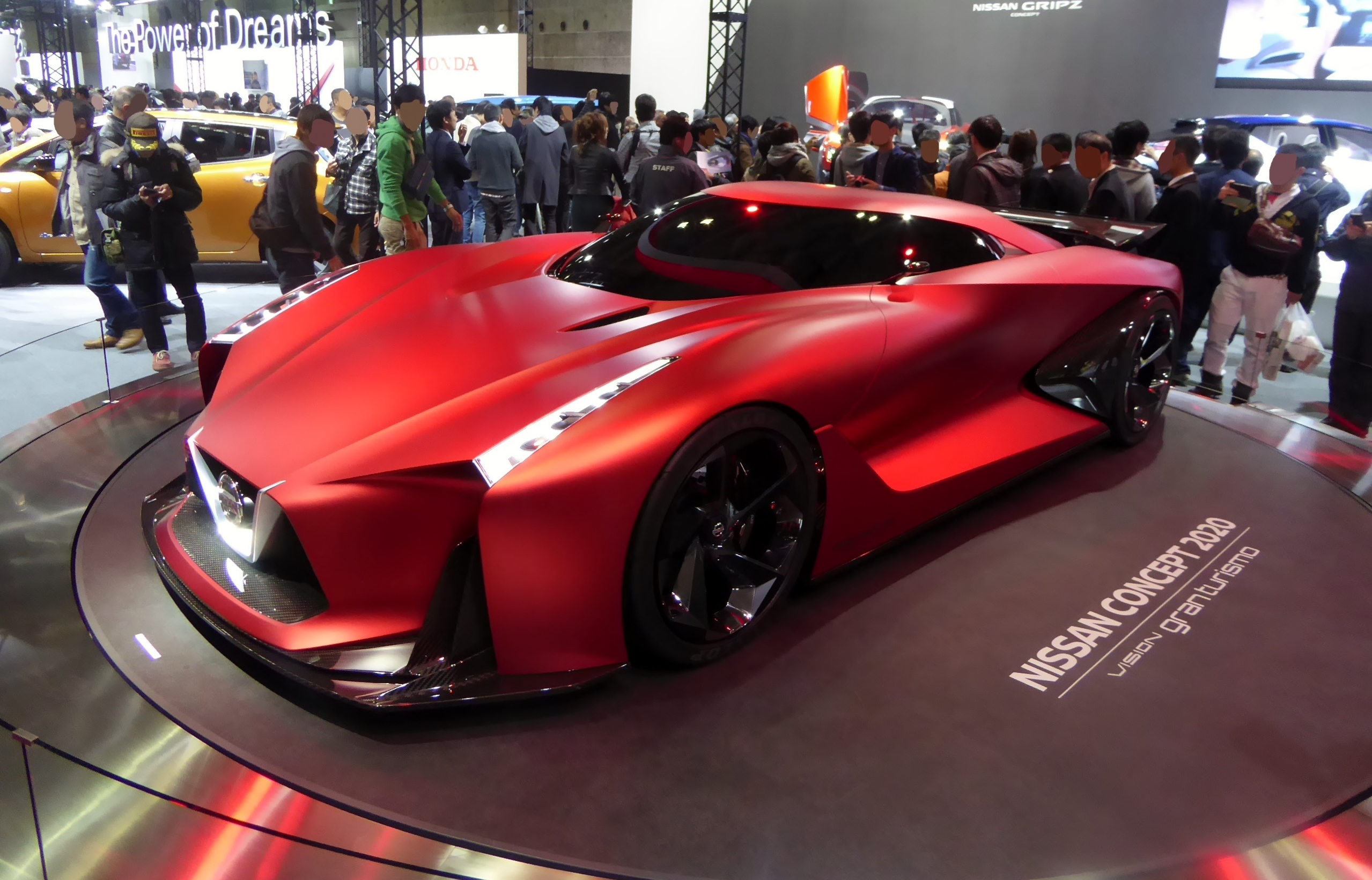 大阪モーターショー2015において日産・コンセプト2020ヴィジョングランツーリスモを撮影。